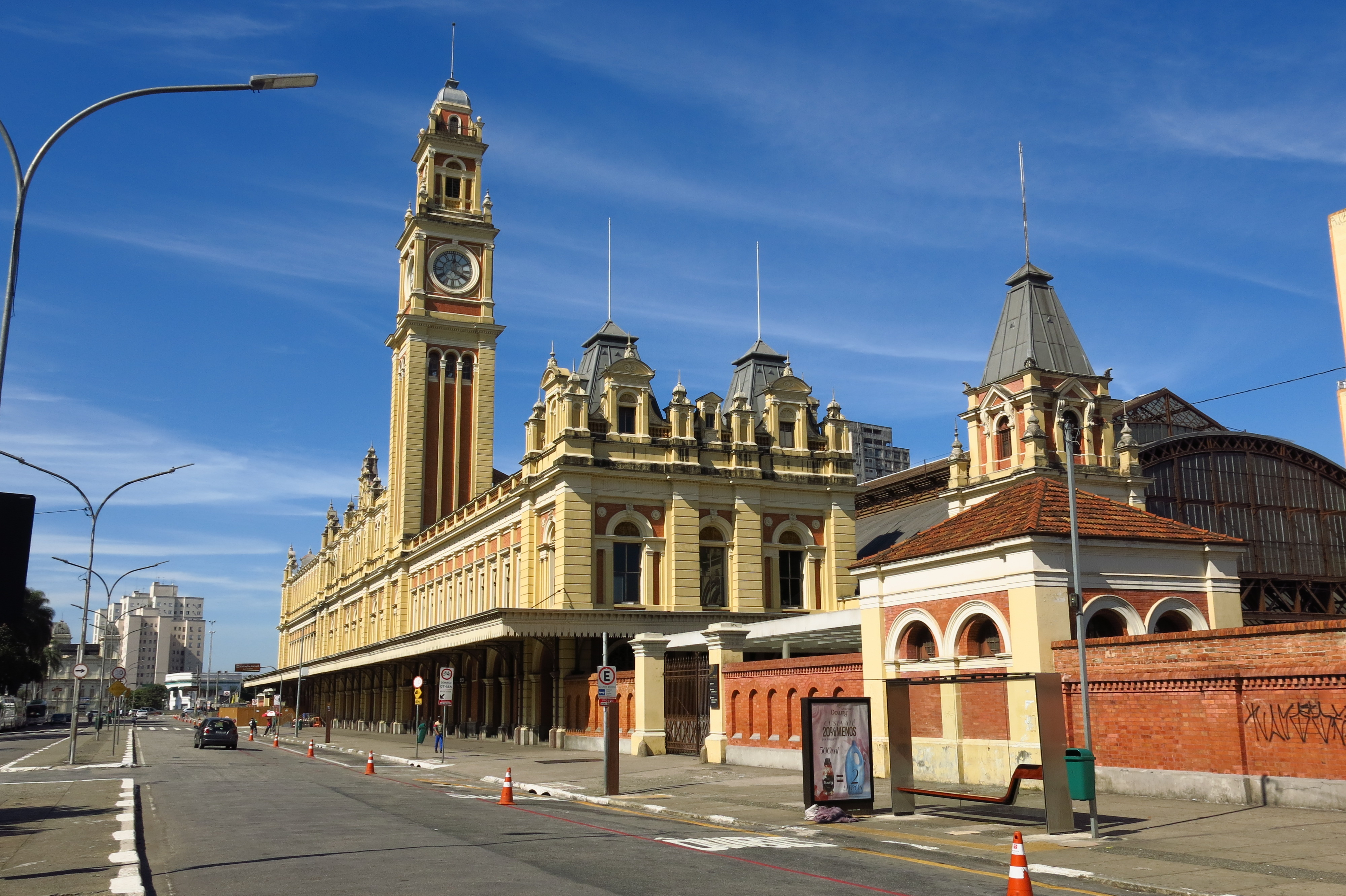 Estação da Luz